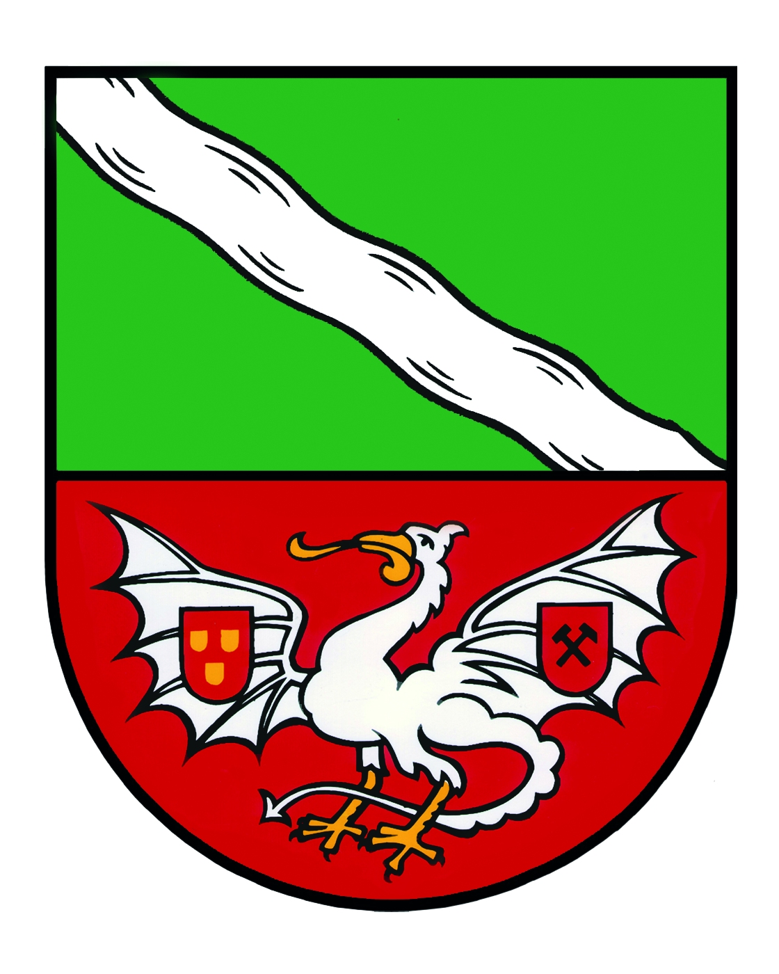 Wappen der Ortsgemeinde Rheinbreitbach